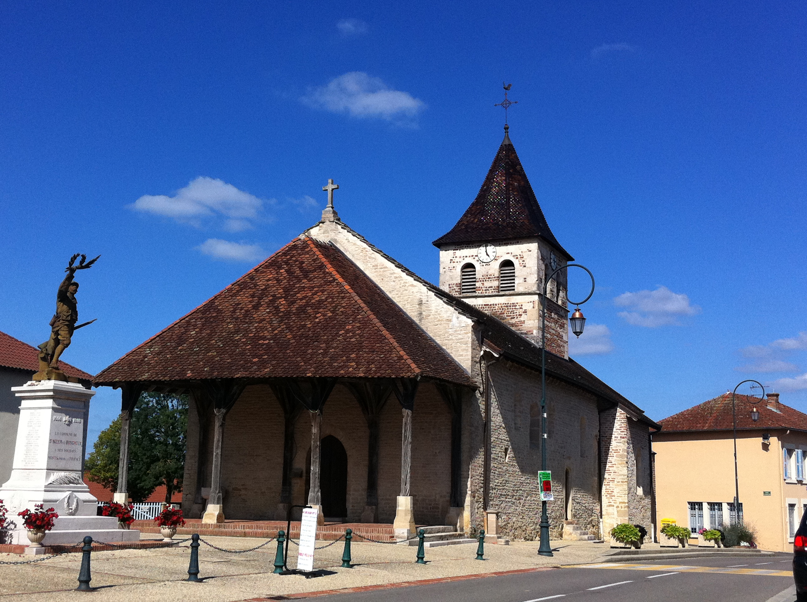 Église Saint-Antoine de Saint-Nizier-le-Bouchoux, Ain, France. Dans le coin inférieur gauche, Le Poilu victorieux d'Eugène Benet.